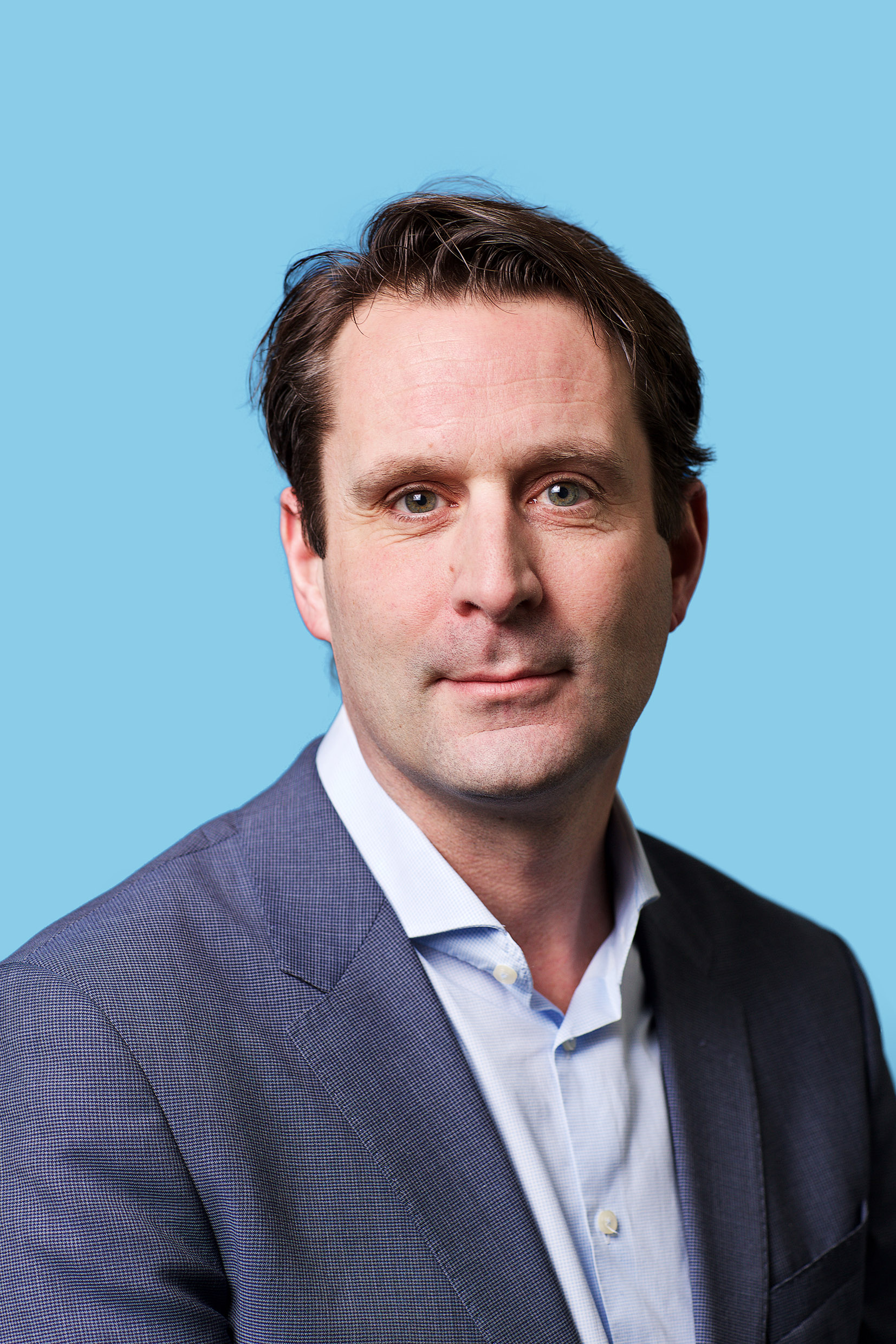 13 februari 2016. Tweede Kamerlid voor de Partij van de Arbeid. Foto: Lex Draijer.